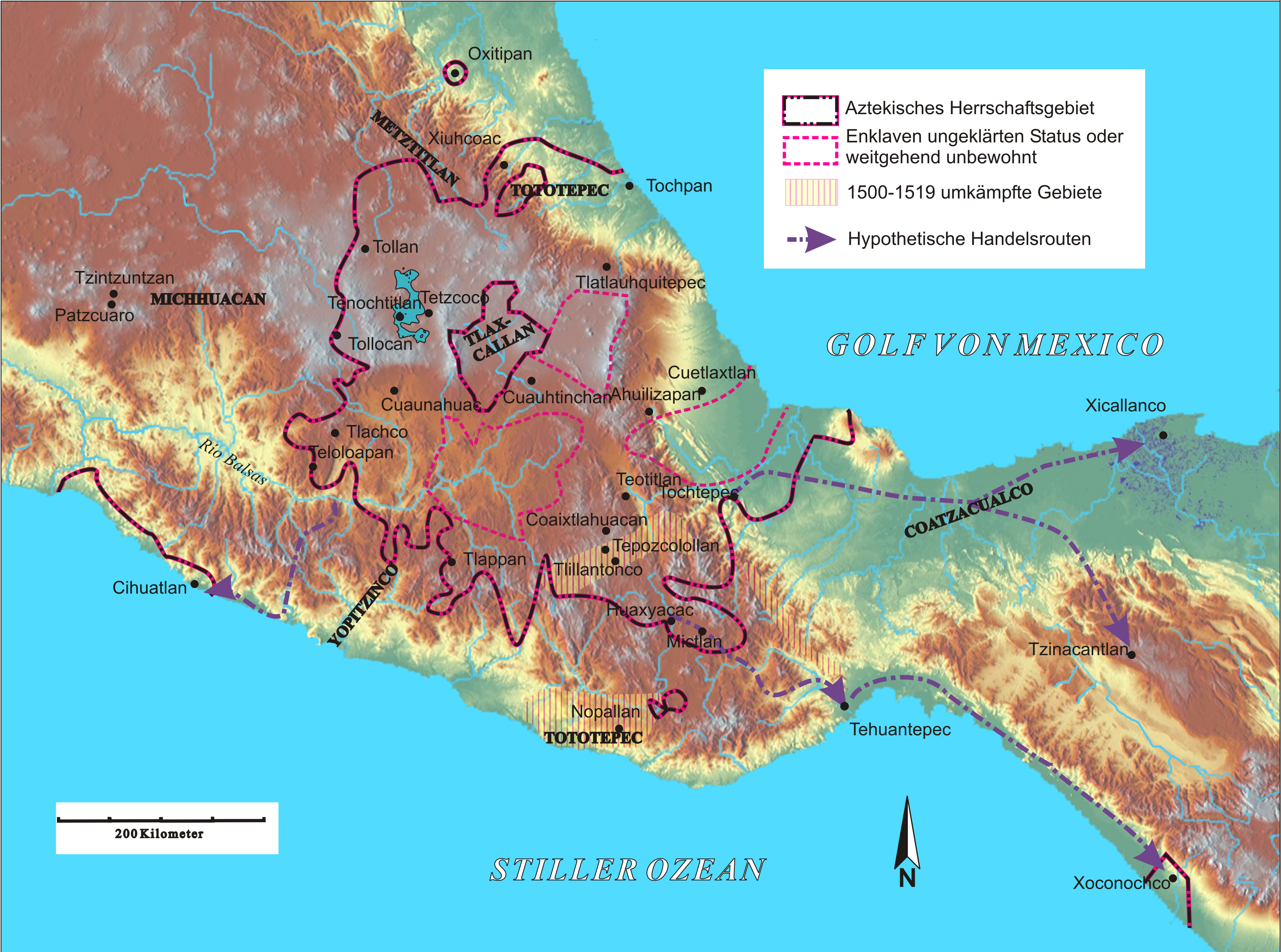 Ausdehnung des "Aztekischen Reiches" kurz vor der Spanischen Eroberung vor 1519